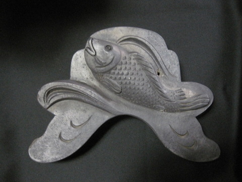 鬼瓦 登龍図